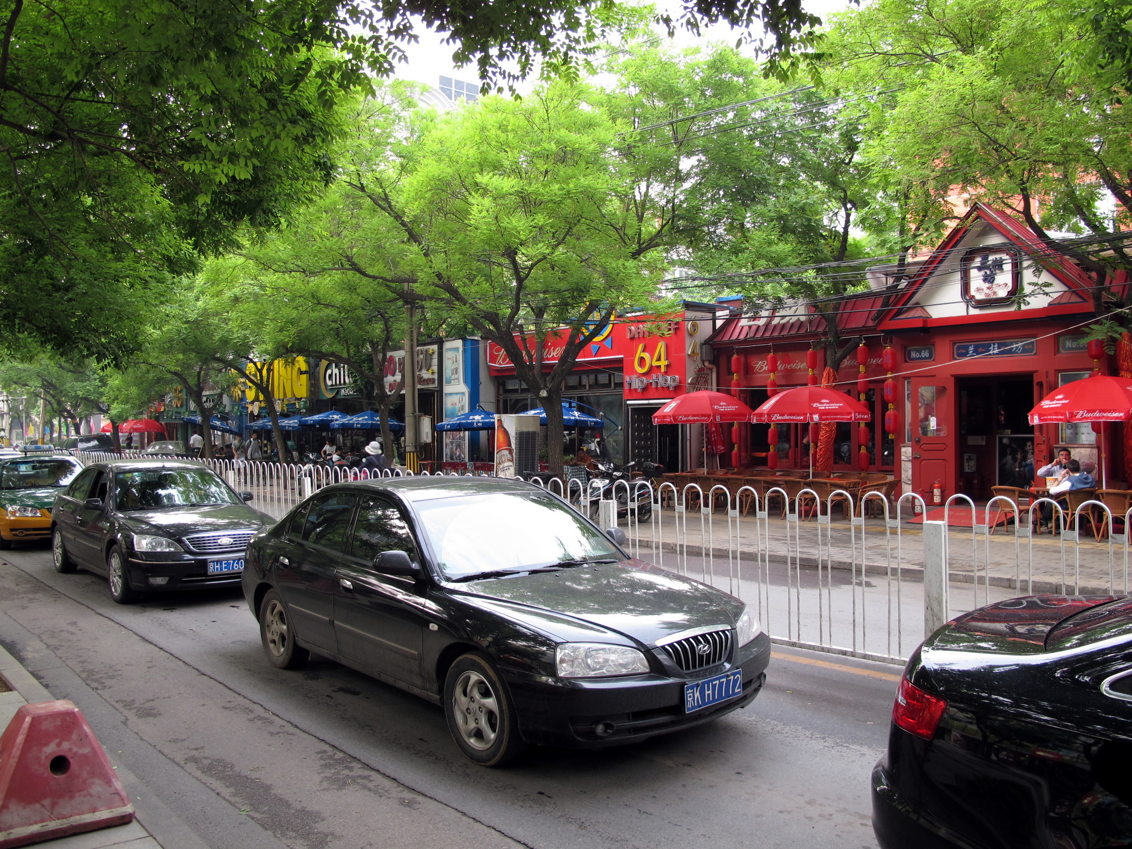 Restaurants in Sanlitun ,Beijing